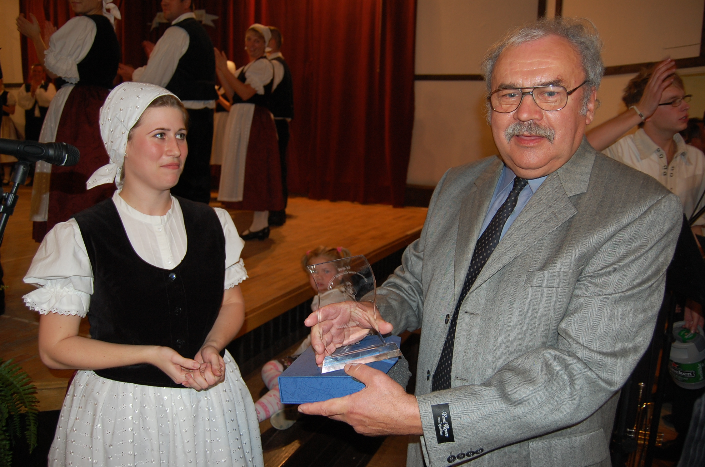 Wenczl József koreográfus 2009-ben